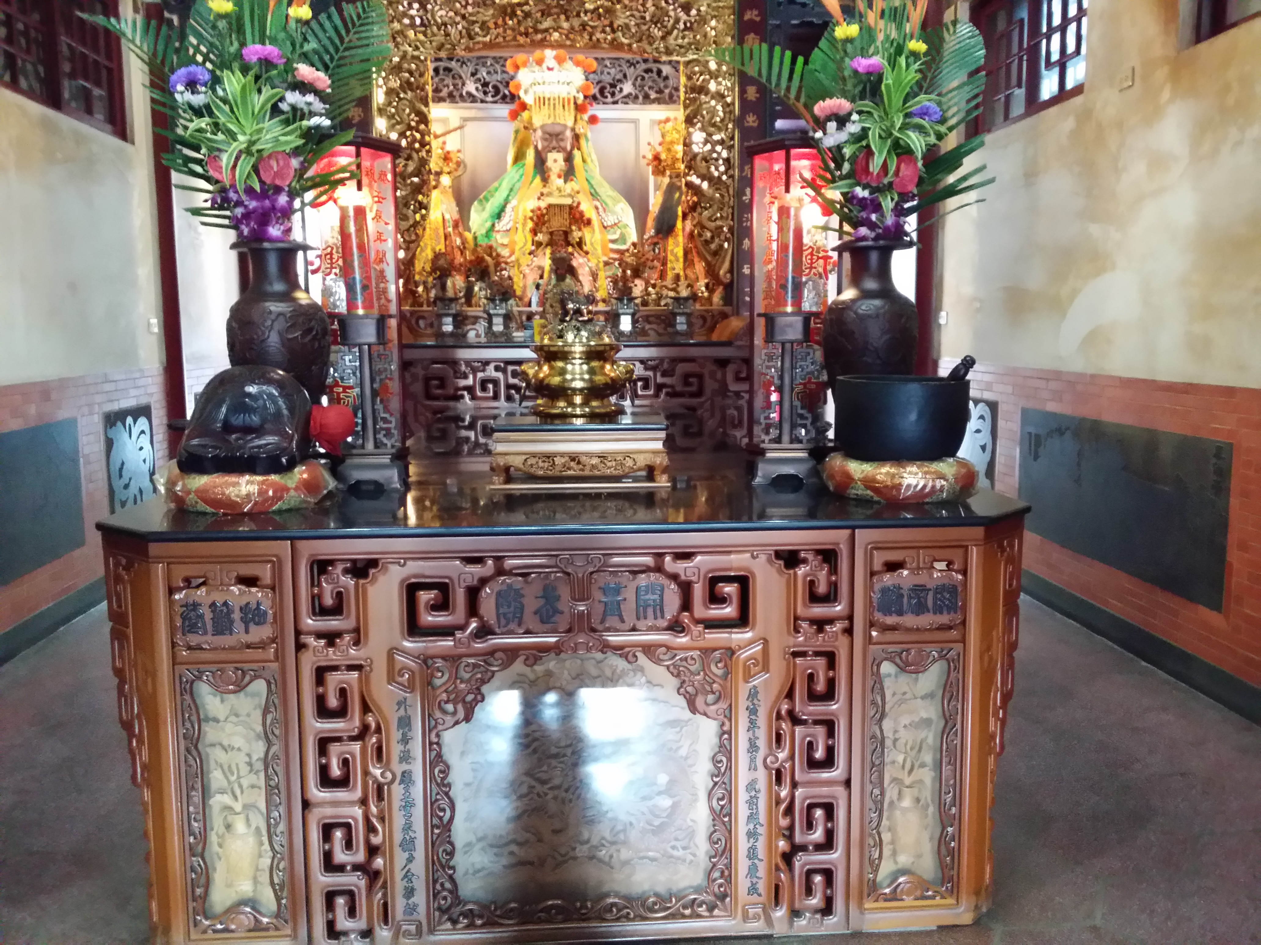 開基武廟原正殿內觀可看到面積相較祀典武廟少很多，因此被稱為小關帝廟